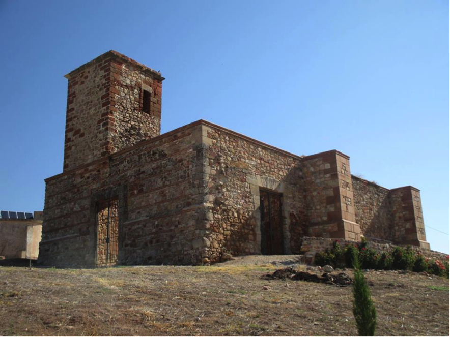 Iglesia de Santa Catalina, Fuenllana (Ciudad Real, España). Foto: Proyecto Arqueológico 'Santa Catalina'.